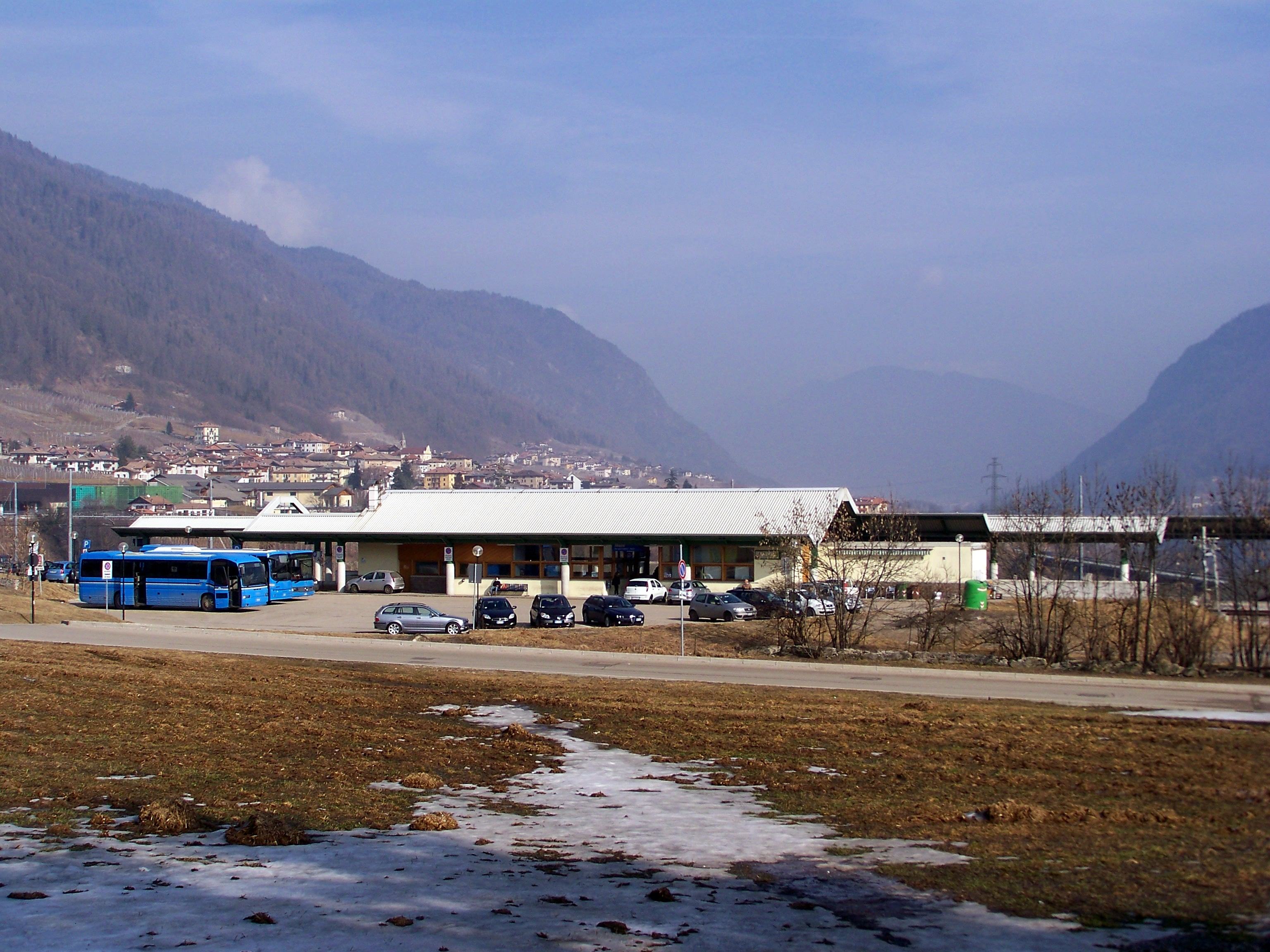 La stazione di Malè.